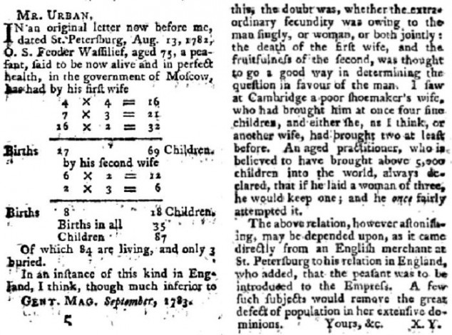 Zmienka o deťoch ktoré splodil Fjoodor